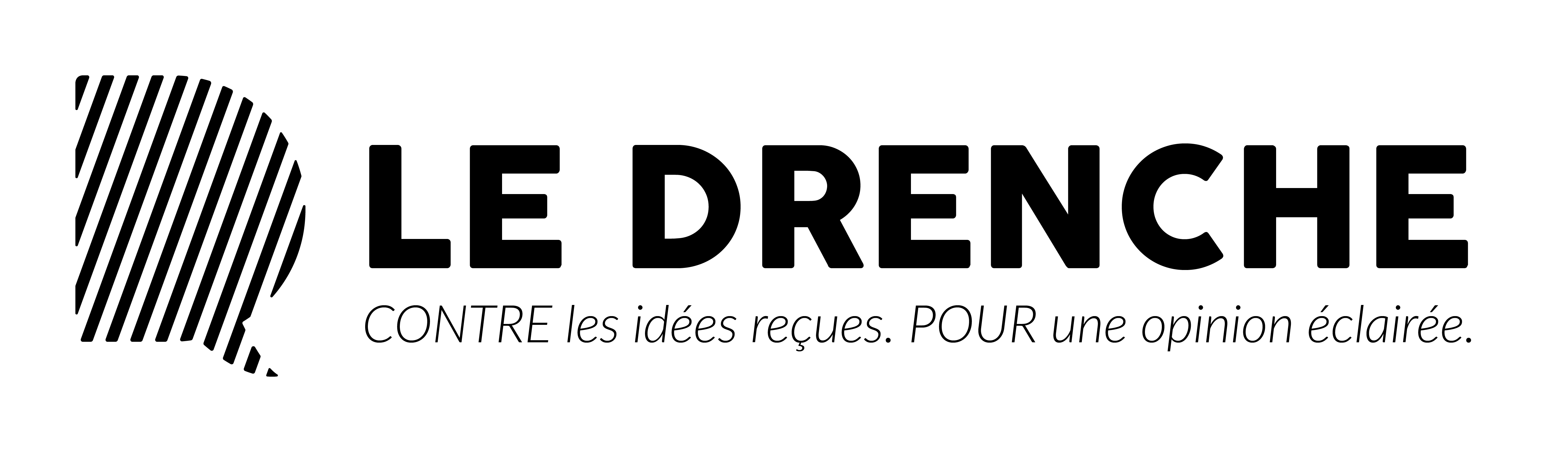 Le logo du journal Le Drenche